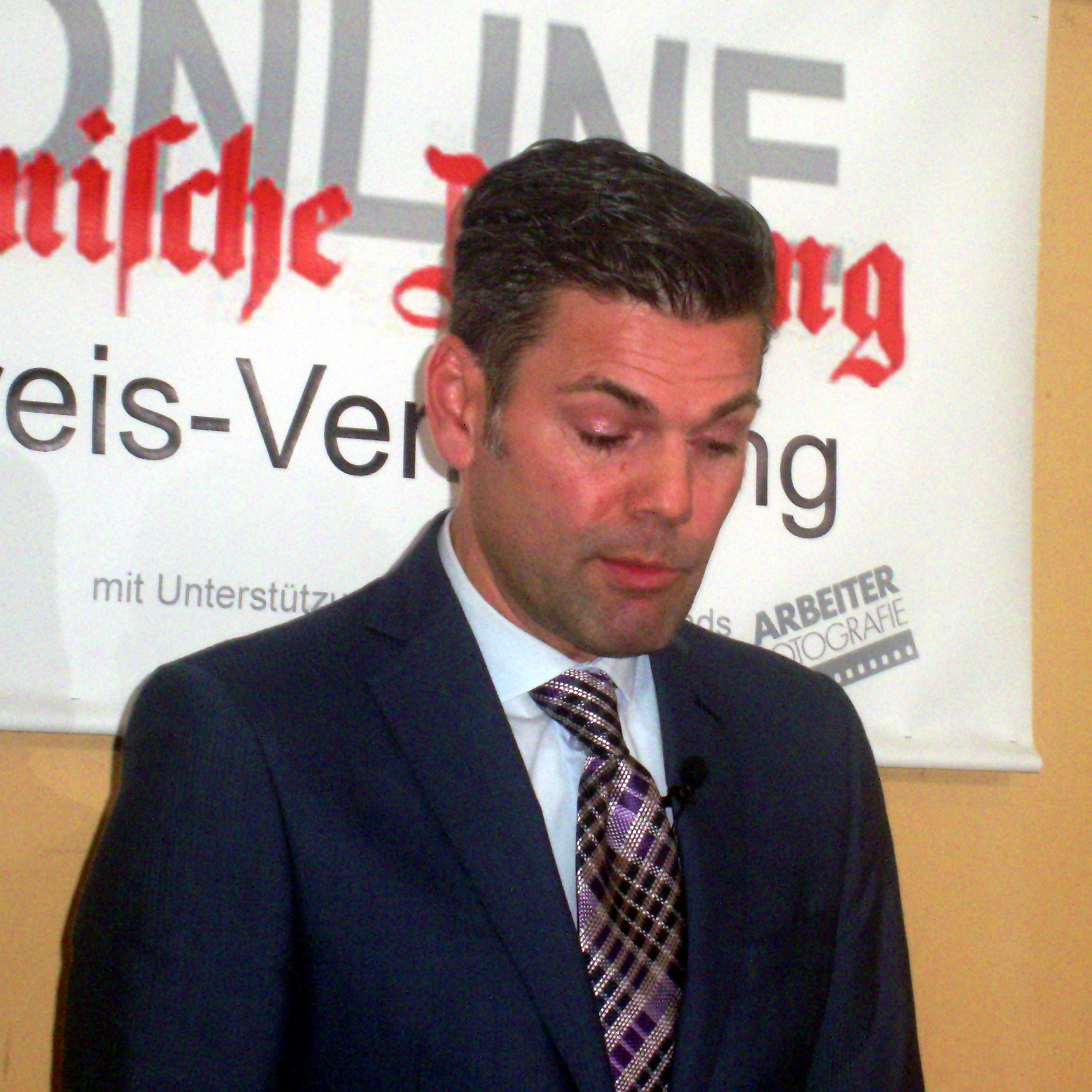 Ken Jebsen bei der Kölner Karlspreisverleihung 2014